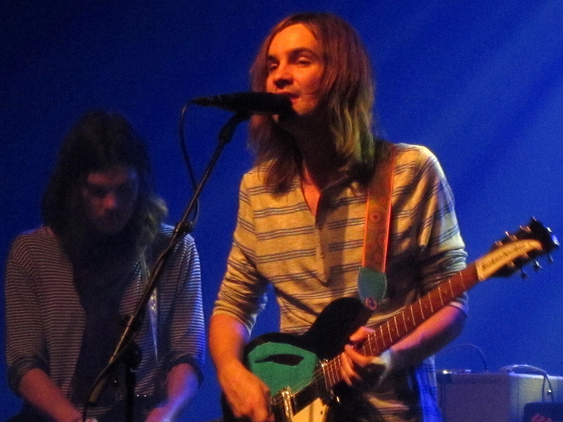 Kevin Parker, zanger-gitarist van Tame Impala.